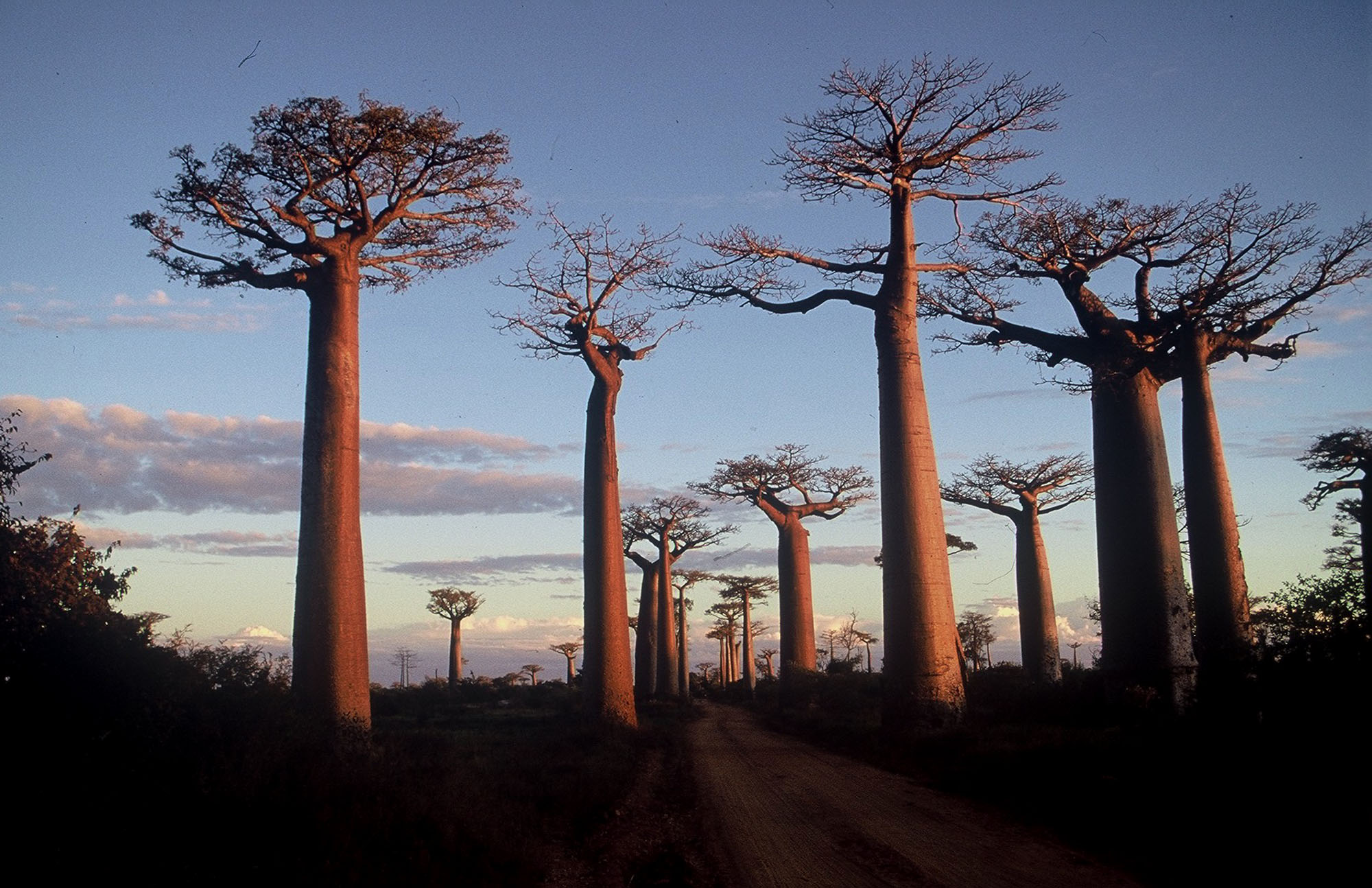 Morondava à Madagascar. La route des baobabs au soleil couchant